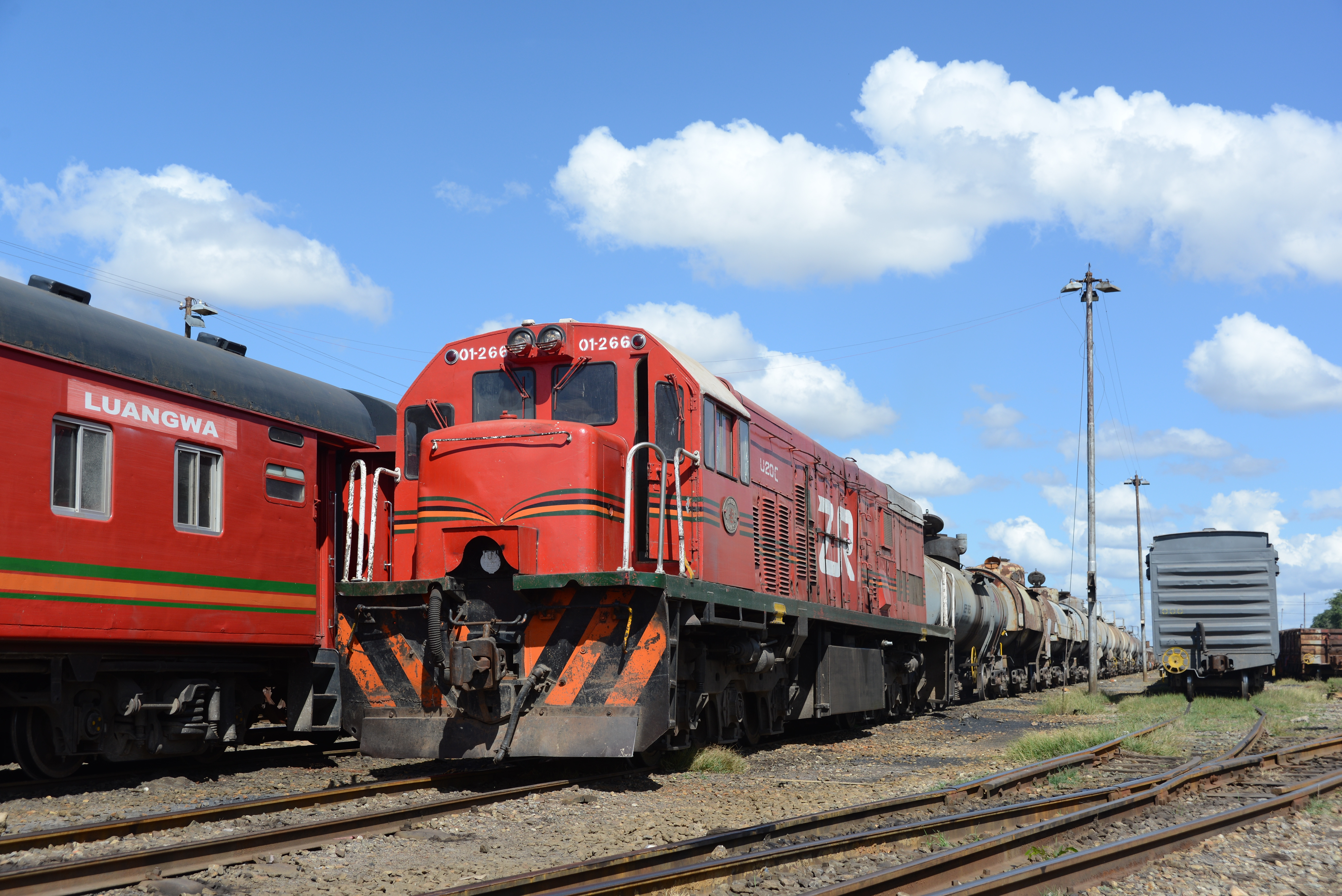 Lok 01-266 im Bahnhof Kusaka am 1. Mai 2017